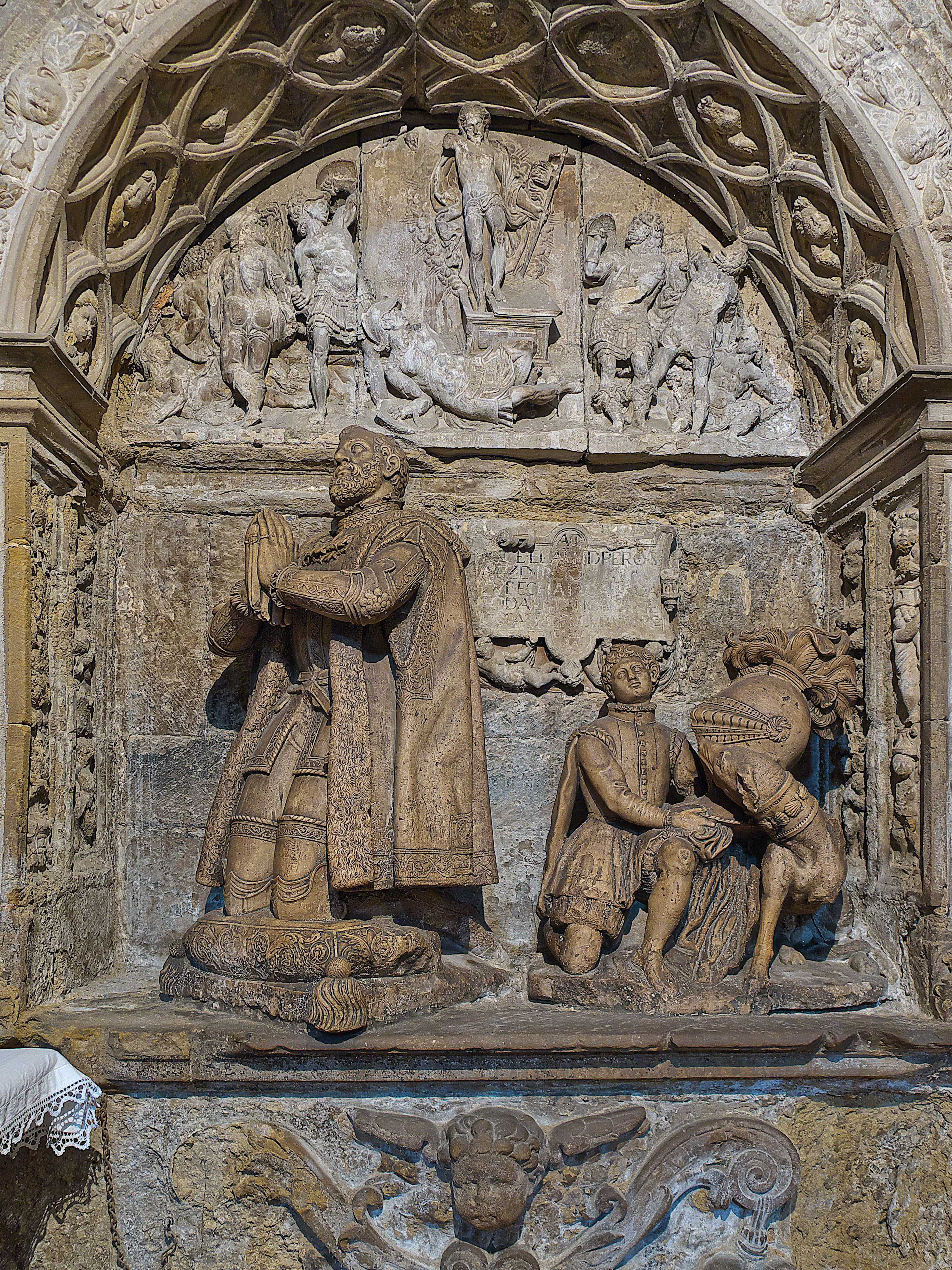 Iglesia de Nuestra Señora de la Asunción (Briones). Capilla de la Concepción, capilla funeraria de Martín y Pedro de Hircio (o Ircio). Figura orante de Pedro de Hircio, primer gobernador de la ciudad de México. Martín, también compañero de Hernán Cortés, conquistador de Nueva España, contrajo matrimonio con María de Mendoza, hija natural del Conde de Tendilla, Íñigo López de Mendoza y Quiñones. El sepulcro es obra de Pedro de Arbulo Margubete (1564)